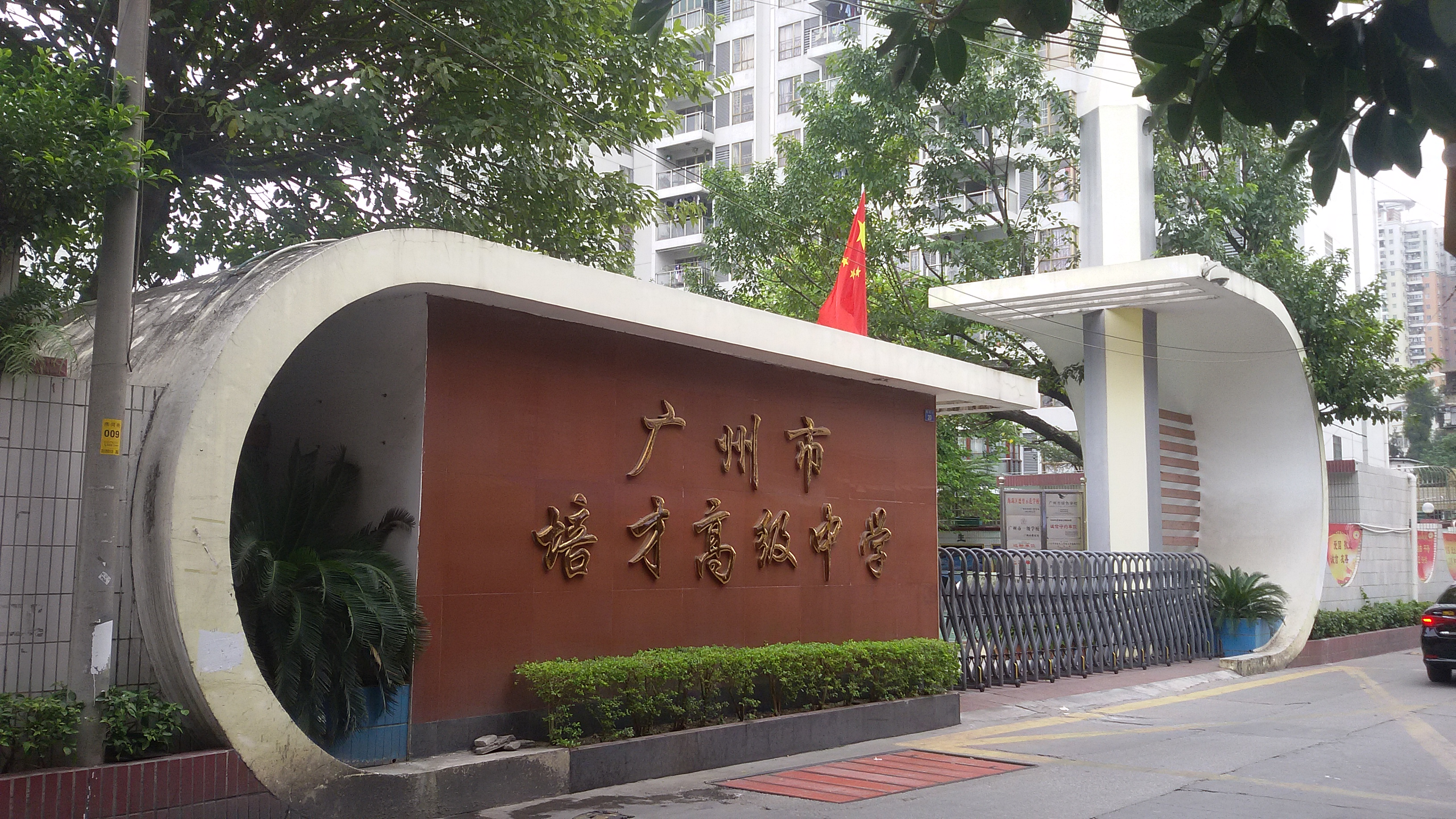 粵語: 廣州市培才高級中學嘅大門